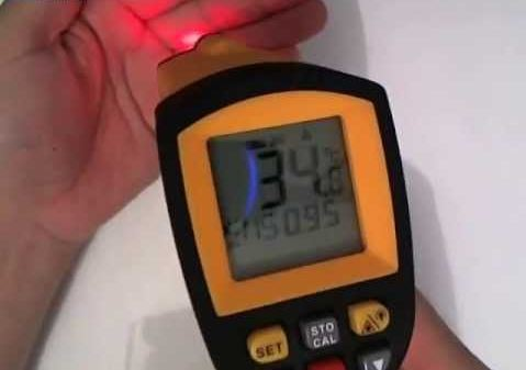 Termômetro infravermelho ou Pirômetro